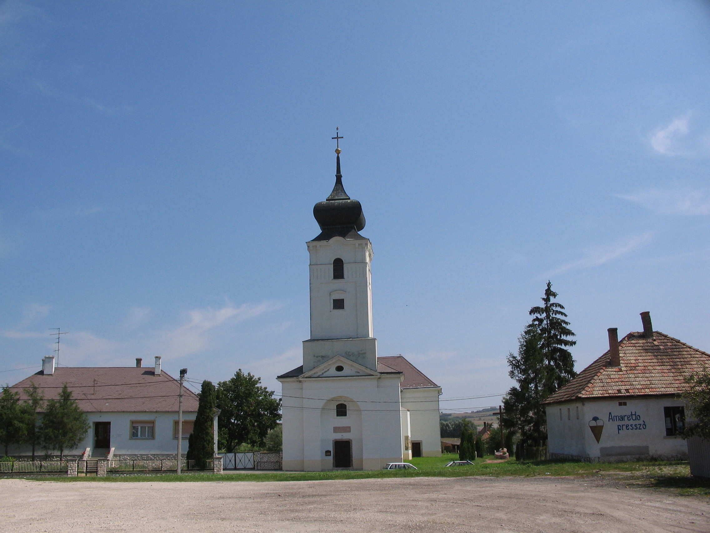 Écs Szent István király római katolikus temploma This is a photo of a monument in Hungary. Identifier: 4038